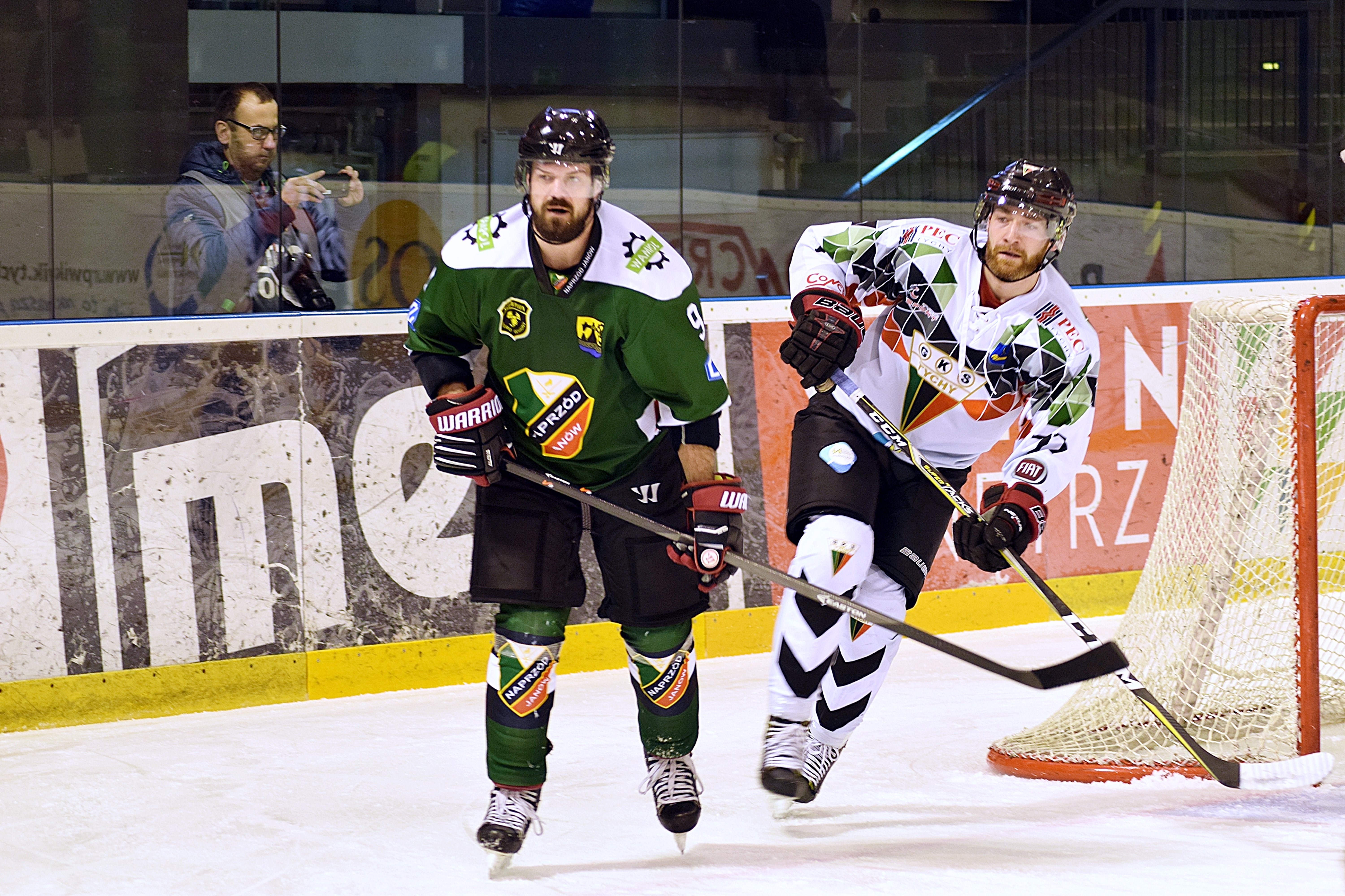 Mecz w Hokeju na lodzie GKS Tychy - Naprzód Janów 8-0. Kamil Charousek (#9, Naprzód Janów) i Mateusz Bepierszcz (#77, GKS Tychy).